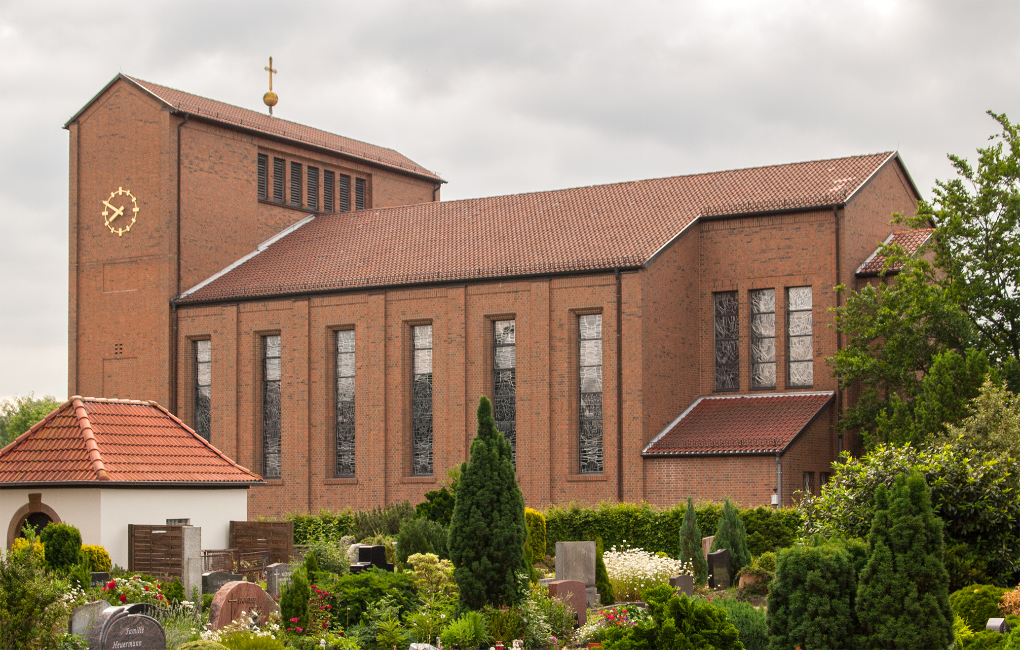 Römisch-katholische Kirche St. Kilian in Schötmar, Stadt Bad Salzuflen, Kreis Lippe